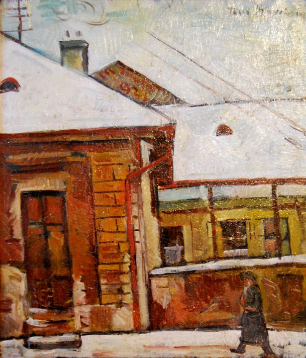 Tasso Marchini(1907-1936) - Peisaj la Sighet, ulei pe pânză, 44 x 38 cm, semnat dreapta sus: „Tasso Marchini”, nedatat.